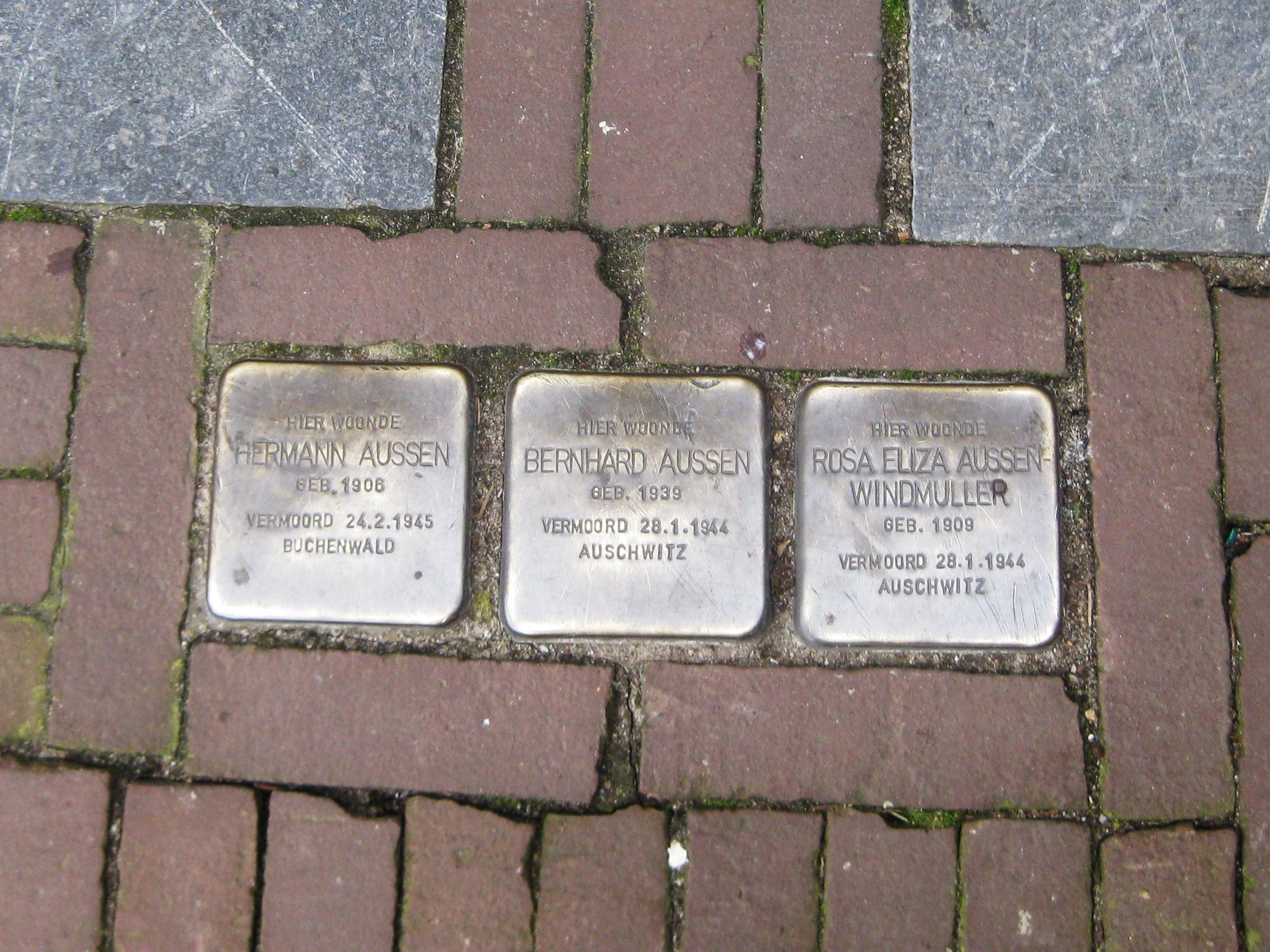 Stolpersteine voor Markt 7, Culemborg. Geplaatst op 16 juni 2012